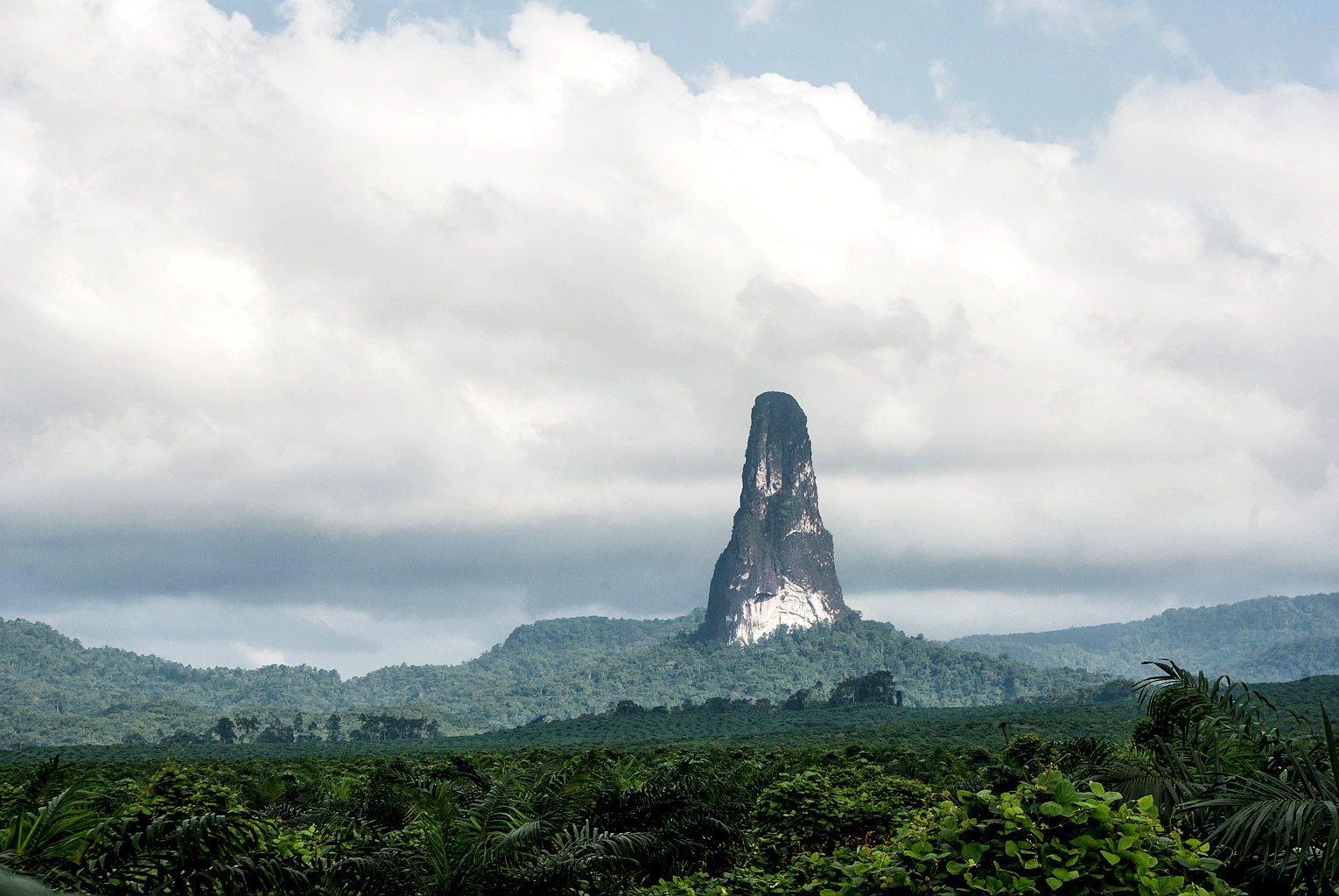 2012SaoTome-308